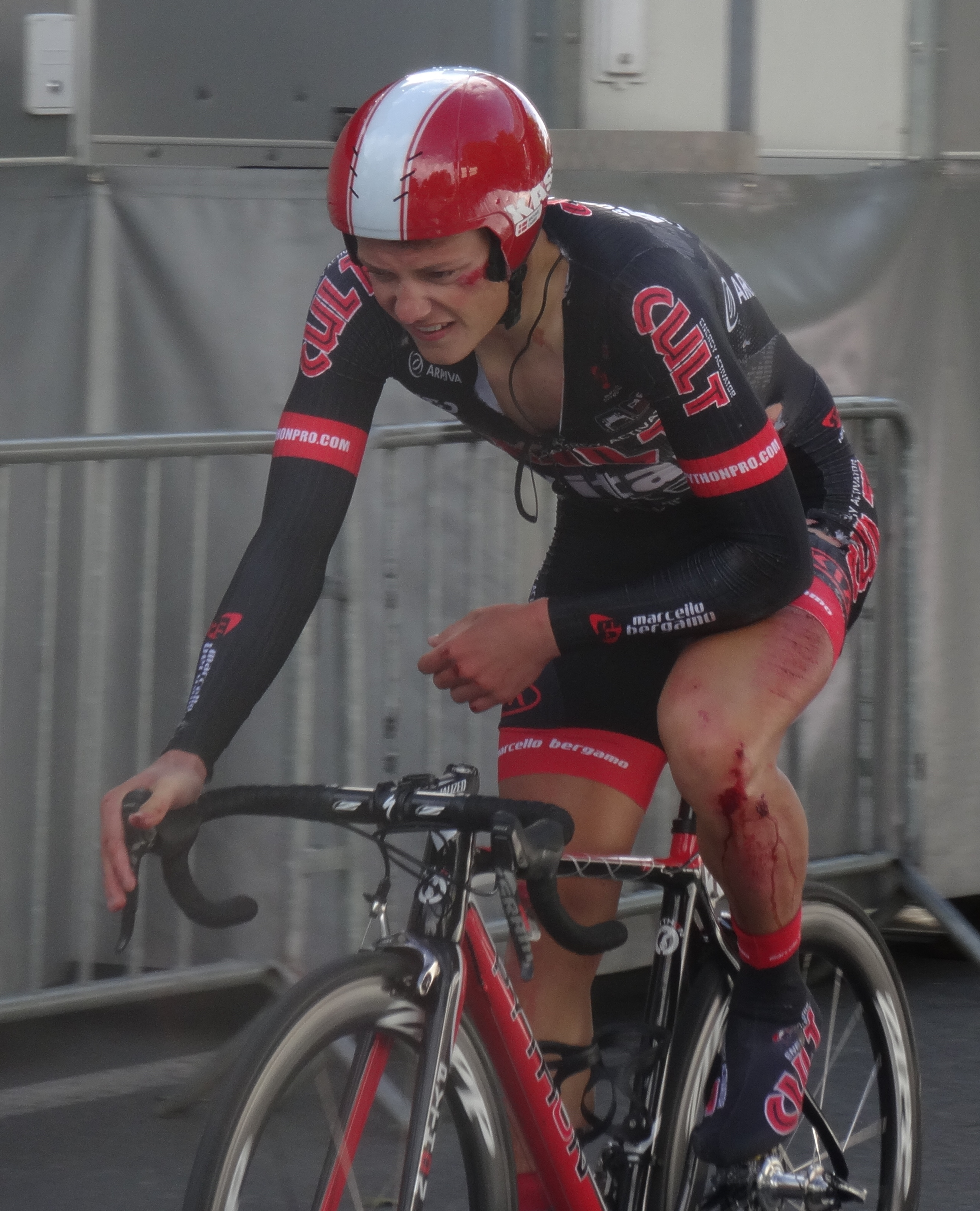 Reportage photographique réalisé le vendredi 23 mai 2014 à l'occasion de l'arrivée de la première étape du Paris-Arras Tour 2014 devant la citadelle d'Arras, Pas-de-Calais, Nord-Pas-de-Calais, France. Depicted person: Michael Carbel Svendgaard Depicted team: Cult Energy Vital Water